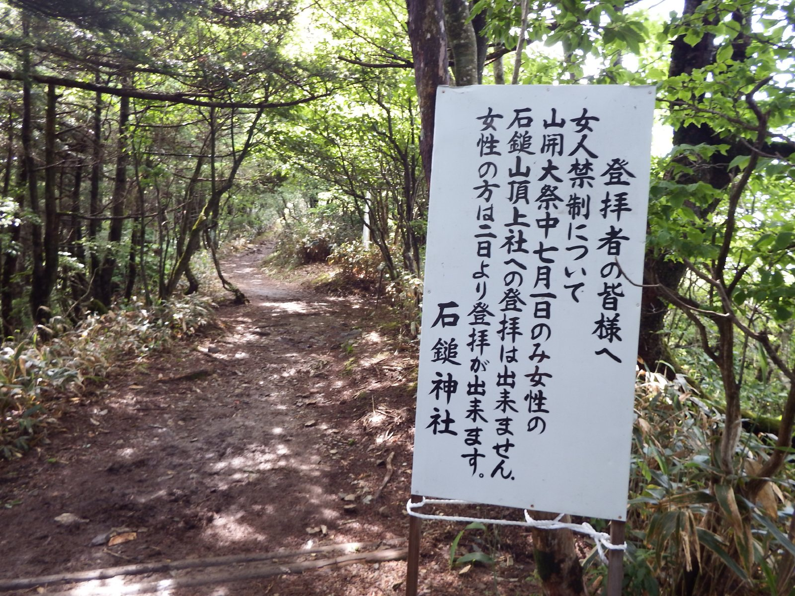 石鎚山の立て看板